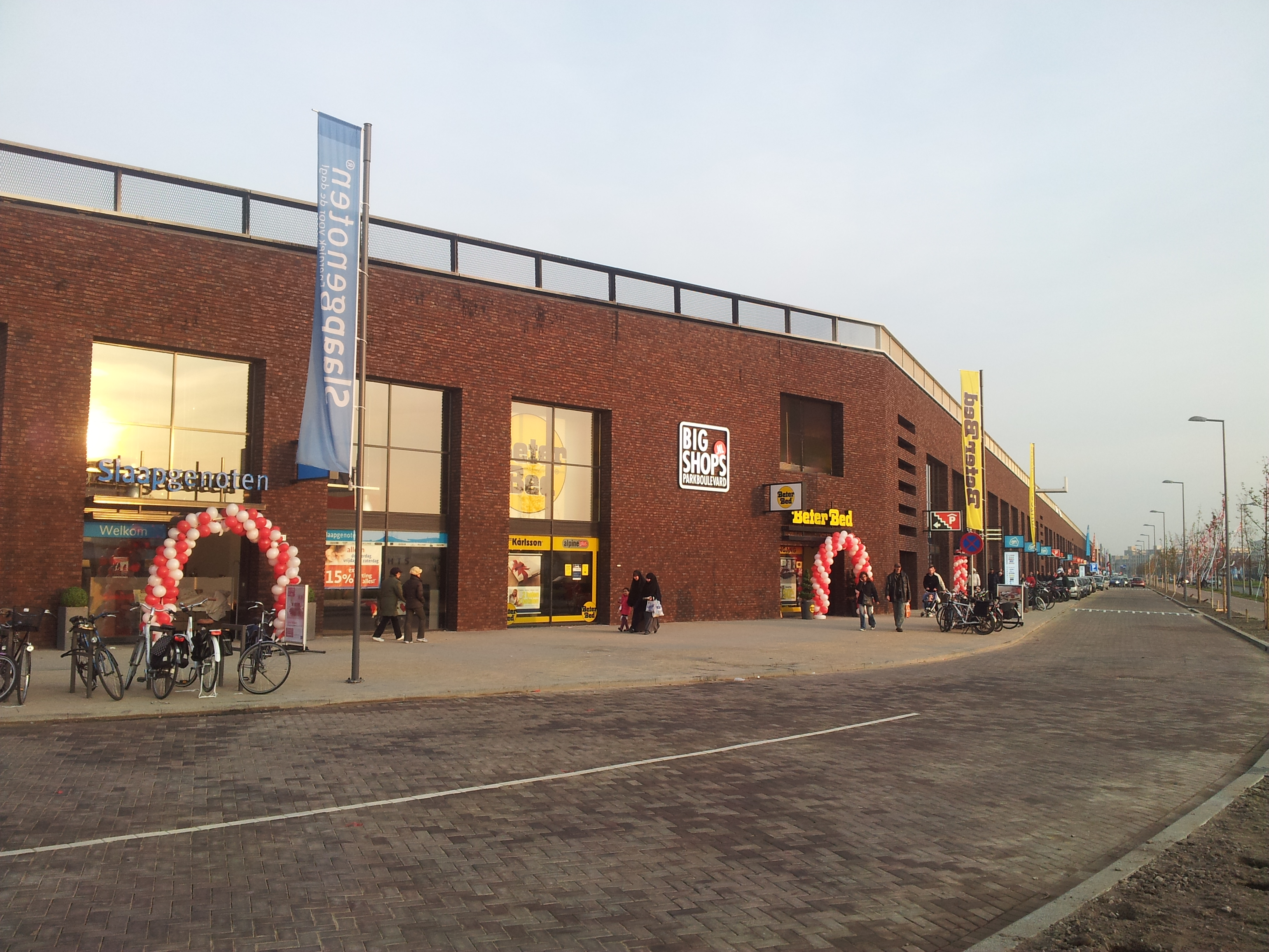 Bigshops Parkboulevard winkelcentrum Delfshaven Rotterdam